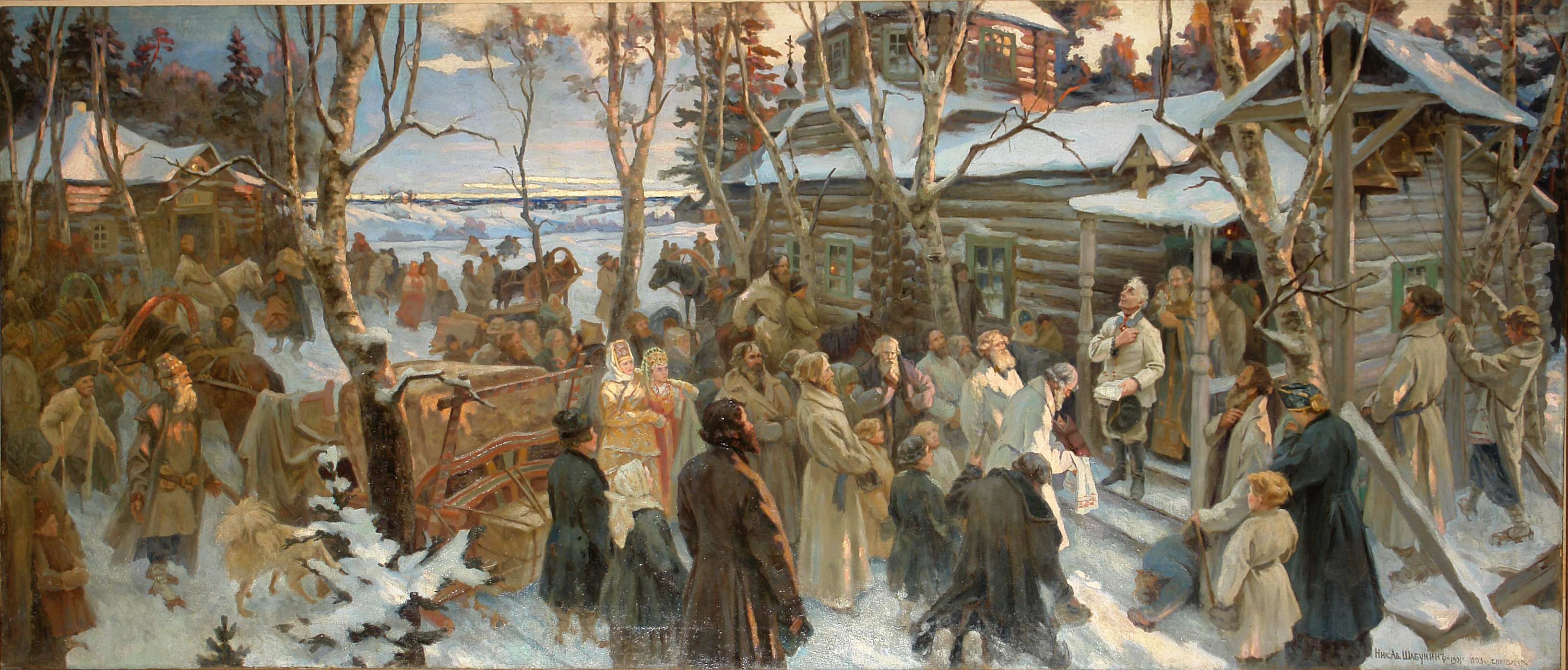 Картина "Отъезд А. В.Суворова из села Кончанского в поход 1799 г." Холст, масло. Государственный мемориальный музей А.В.Суворова